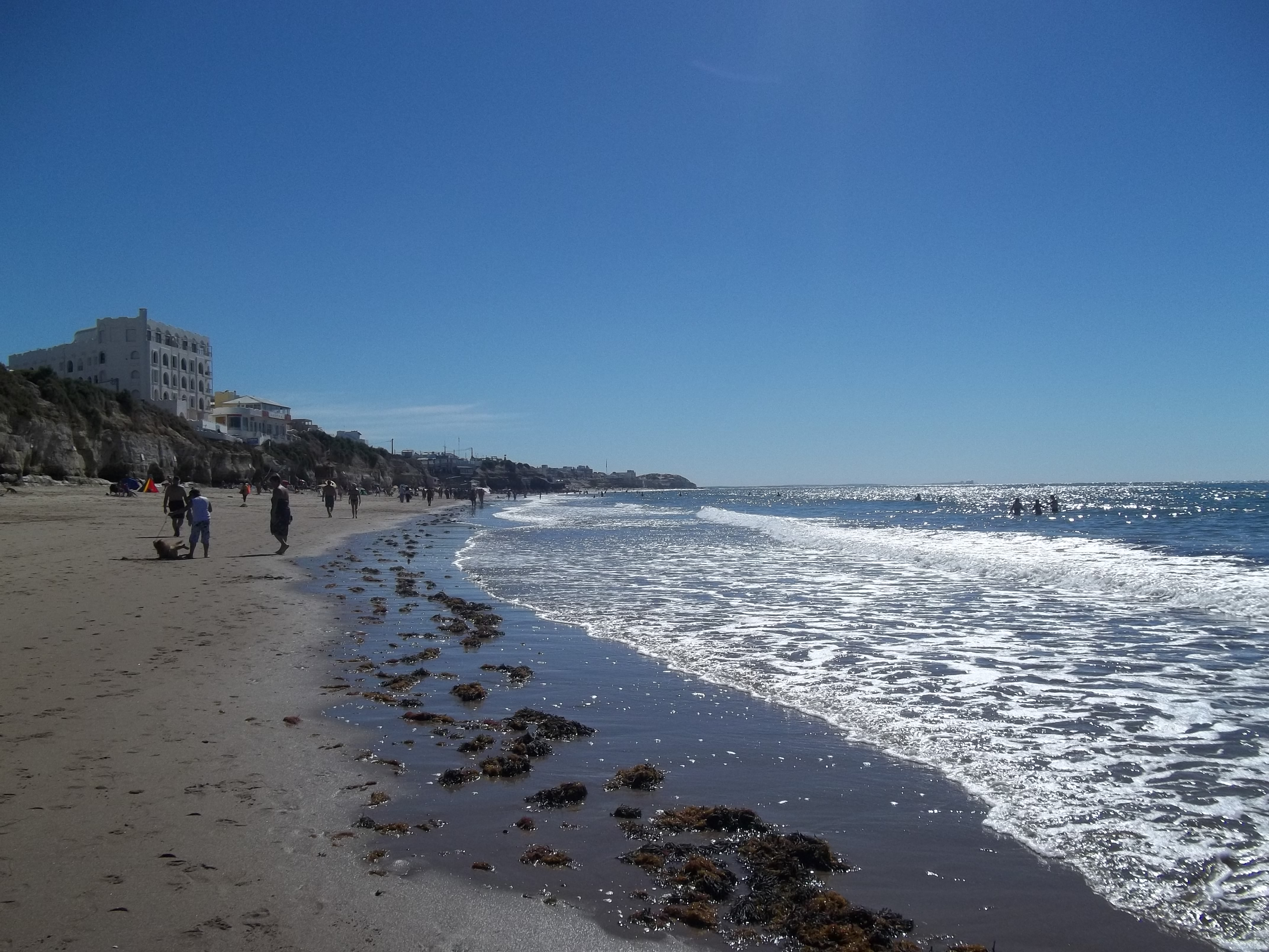 Vista de las playas de Las Grutas, Río Negro, Argentina.